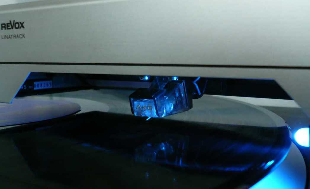 Revox audio equipment